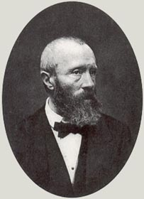 Etienne Joseph Théophile Thoré (Thoré-Bürger), 1807-1869. Photograph from the sales catalogue of his collection, 1892